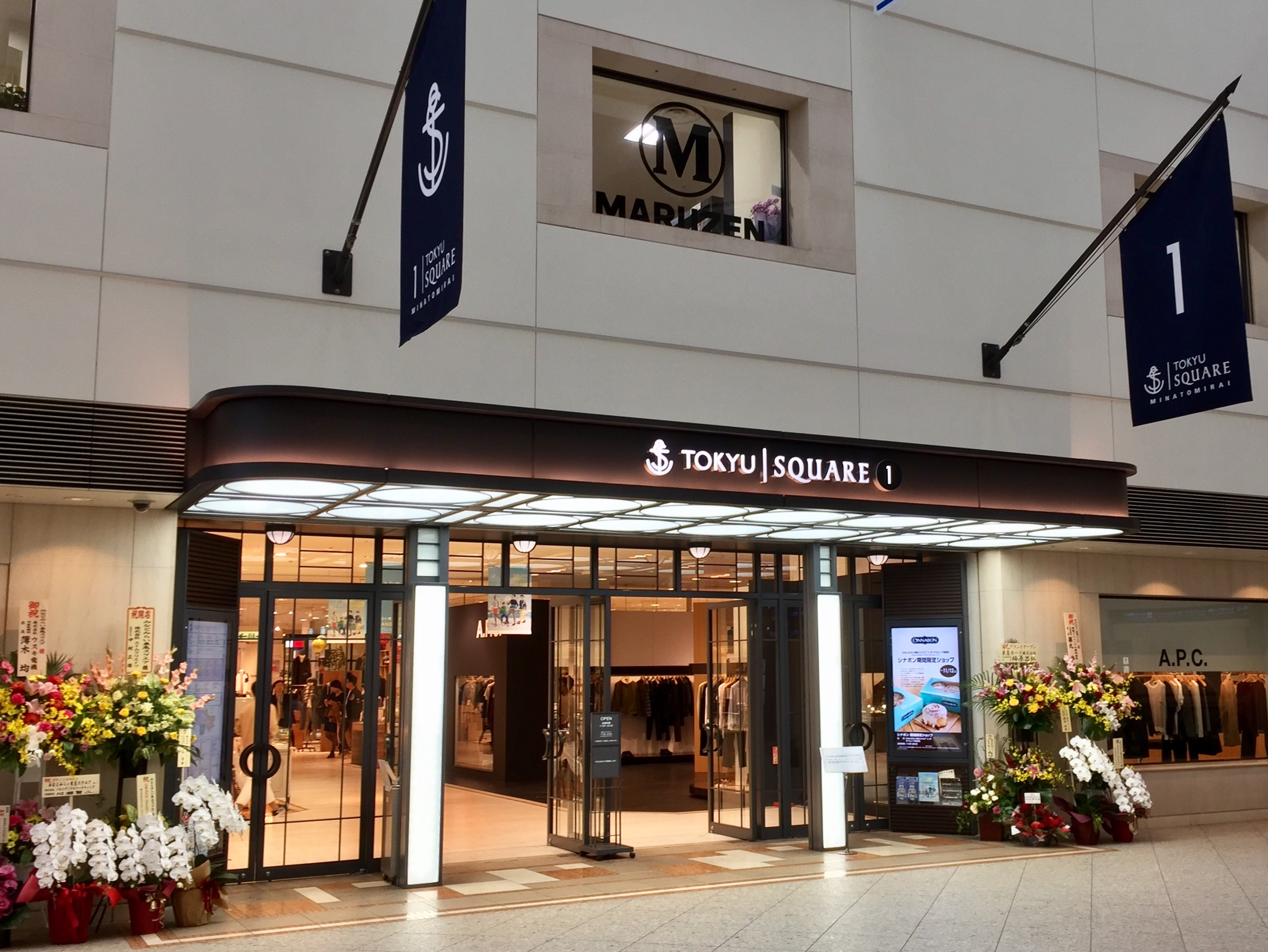 みなとみらい東急スクエア①（旧クイーンズイースト）の入口。